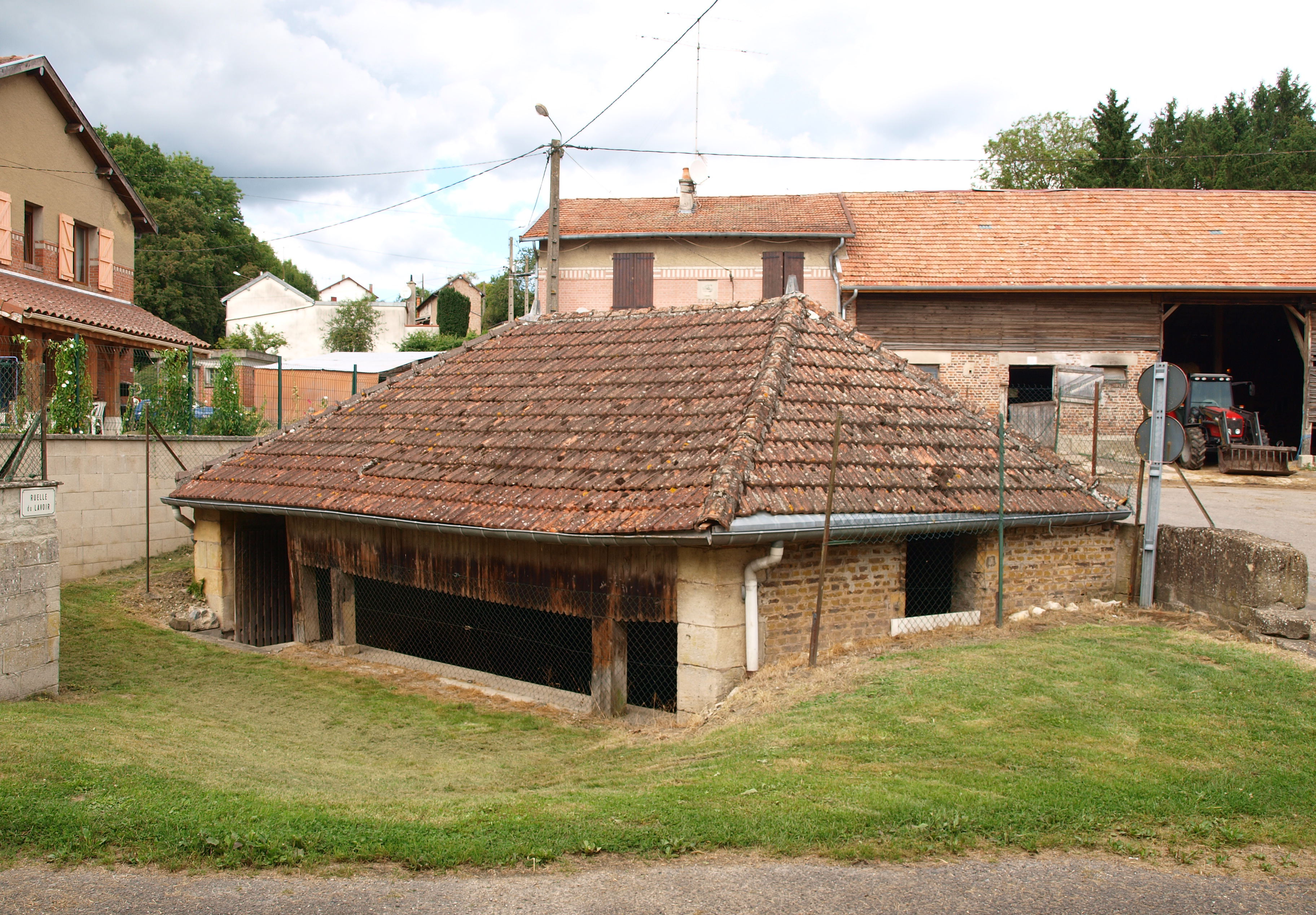 Autry (Ardennes, France) ; lavoir